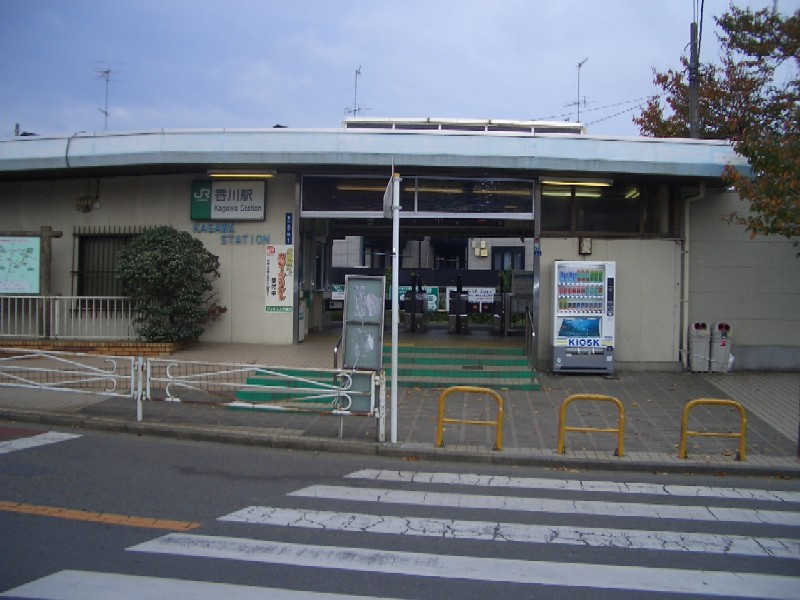 Kagawa Station on JR Sagami Line, Chigasaki, Kanagawa 香川駅